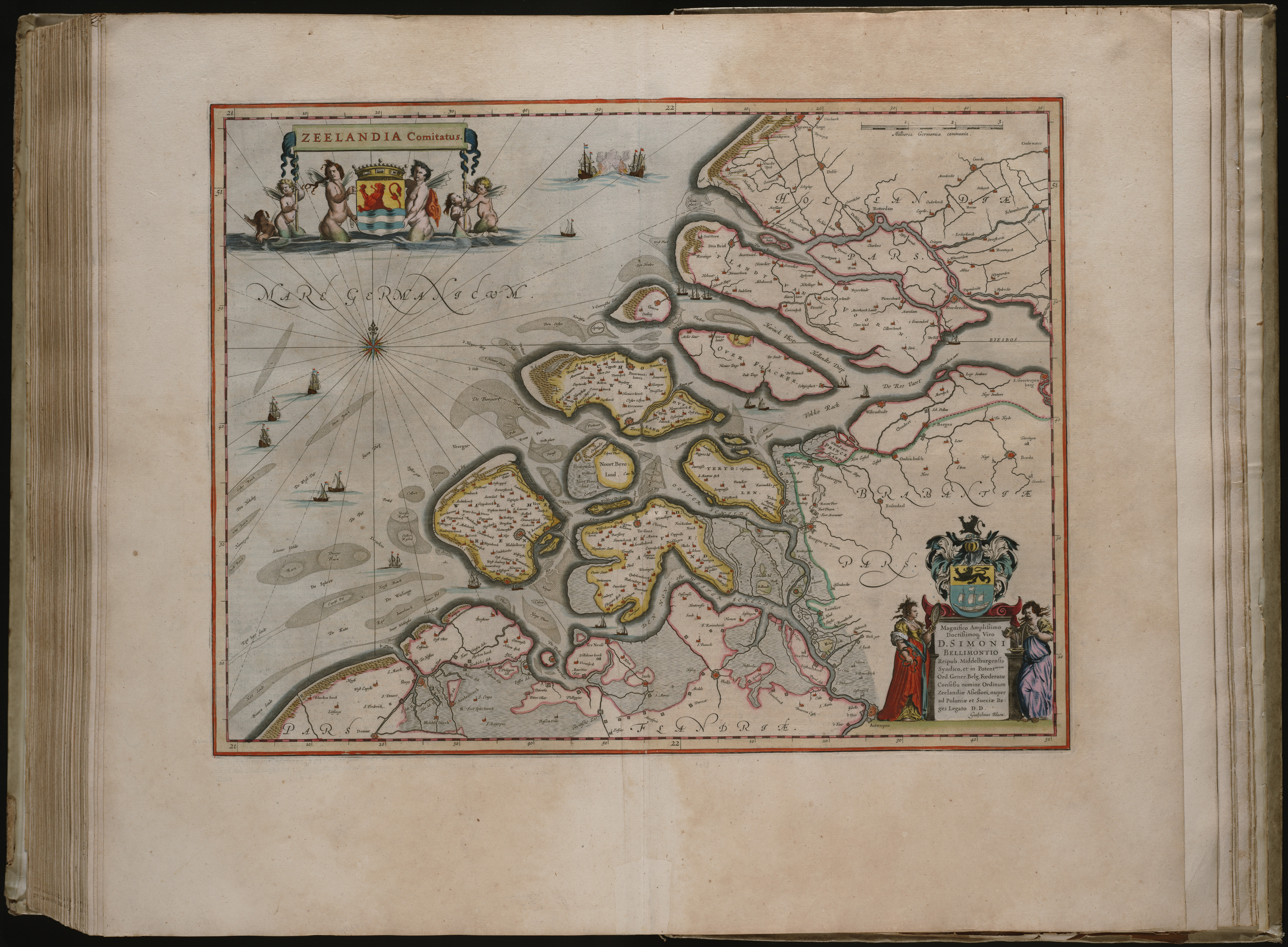 Zeelandia Comitatus: Kaart van het graafschap Zeeland rond 1630